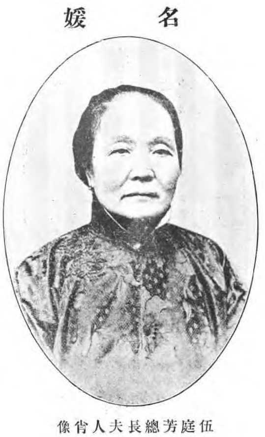 治家全書圖像